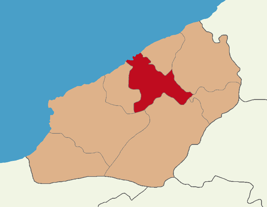 Merkez ilçesinin konumu